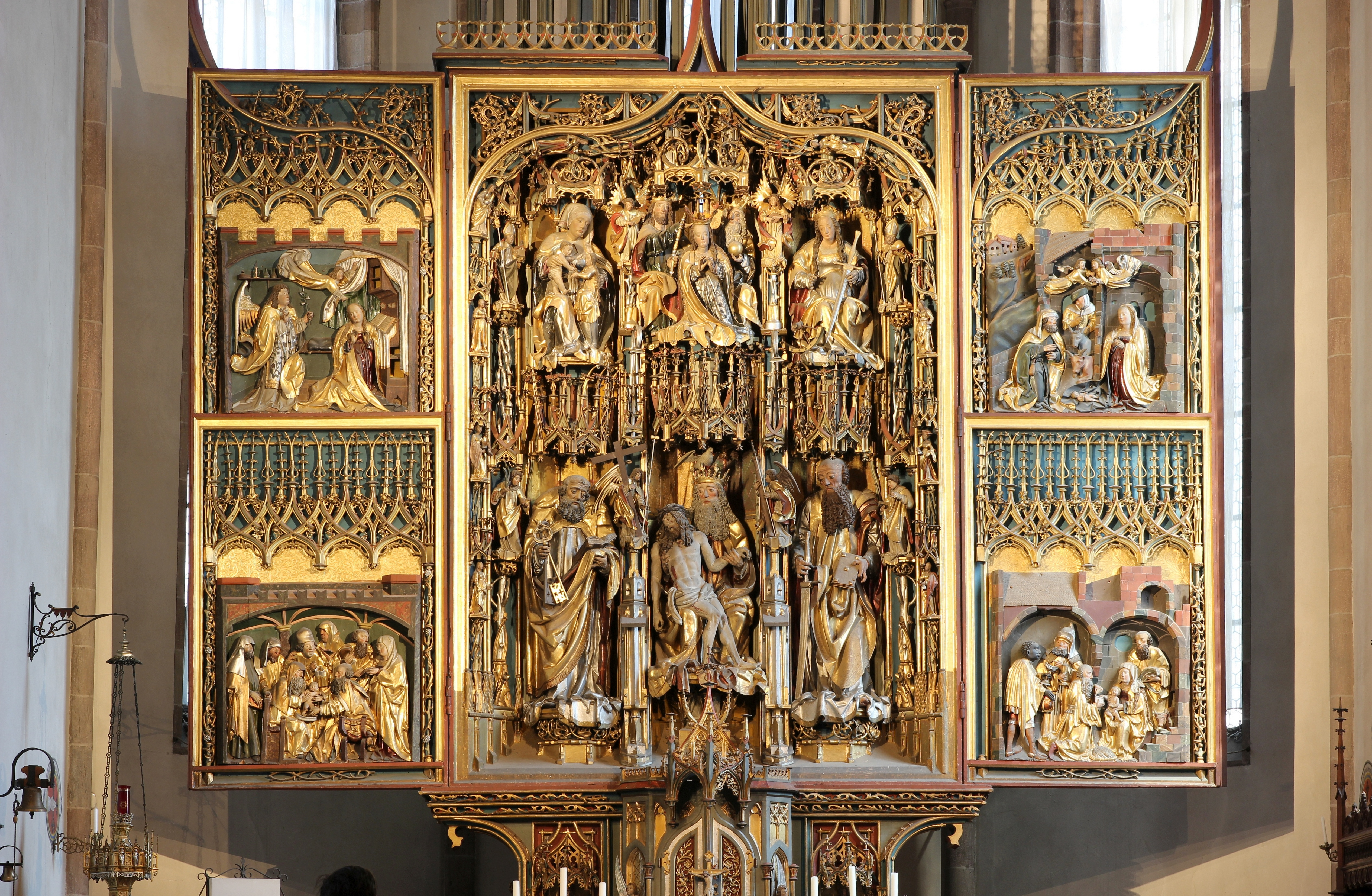 Schnatterpeckaltar in der Pfarrkirche Mariä Himmelfahrt, Lana